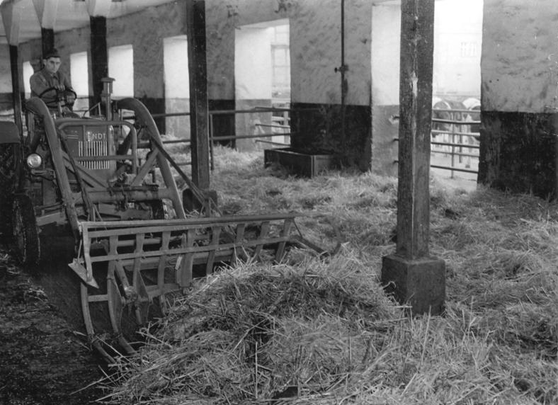 Eisleben, Bauer beim Ausmisten Zentralbild -Schmidt Me 24.12.1959 Volksgut Eisleben im Kampf um das Weltniveau Die Einführung der neuesten wissenschaftlichen Erkenntnisse in der Viehzucht führten auch in den Kuhställen des VEG Eisleben zu weit besseren Ergebnissen.In den Abteilungen Helfta und Seeburg wurden alte Ställe als Laufställe mit mechanischer Entmistung und Fischgrätenmelkstand umgebaut. An den Futterplätzen brachten die Landarbeiter außerdem Fanggitter an, die das Einfangen von 28 Kühen mit einem Handgriff ermöglichen.Waren vor dem Umbau des Kuhstalles in Seeburg 8 Kräfte notwendig, um die über 100 Kühe zu betreuen, so schaffen diese Arbeit jetzt vier mit weit weniger Kraftaufwand.Da sich die Tiere den ganzen Tag frei bewegen können, wird außerdem die Lebensdauer verlängert und eine weit bessere Trächtigkeit der Tiere erreicht.Trotz der Fanggitter, die nur zu den Futterzeiten geöffnet, aber ein Vergeuden von Futter unmöglich machen, liegt die Milchleistung im Seeburger Kuhstall in diesem Jahr 300 Kilogramm höher als 1958. UBz: Sehr leicht geschieht das Ausmisten des Stalles mittels Treckers, der von dem Kollegen Alfred Barthel von der Stallbrigade bedient wird.